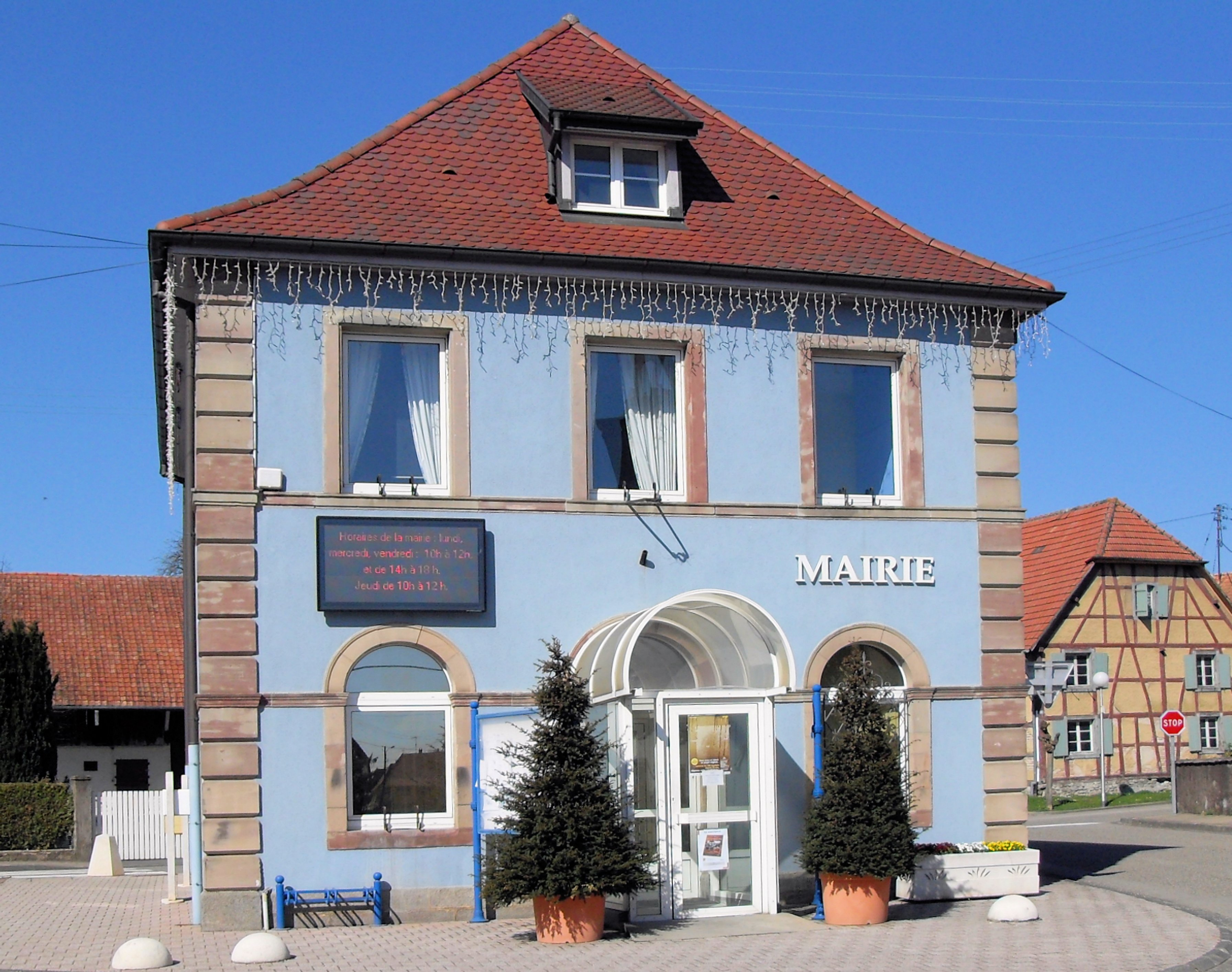 La mairie Burnhaupt-le-Bas